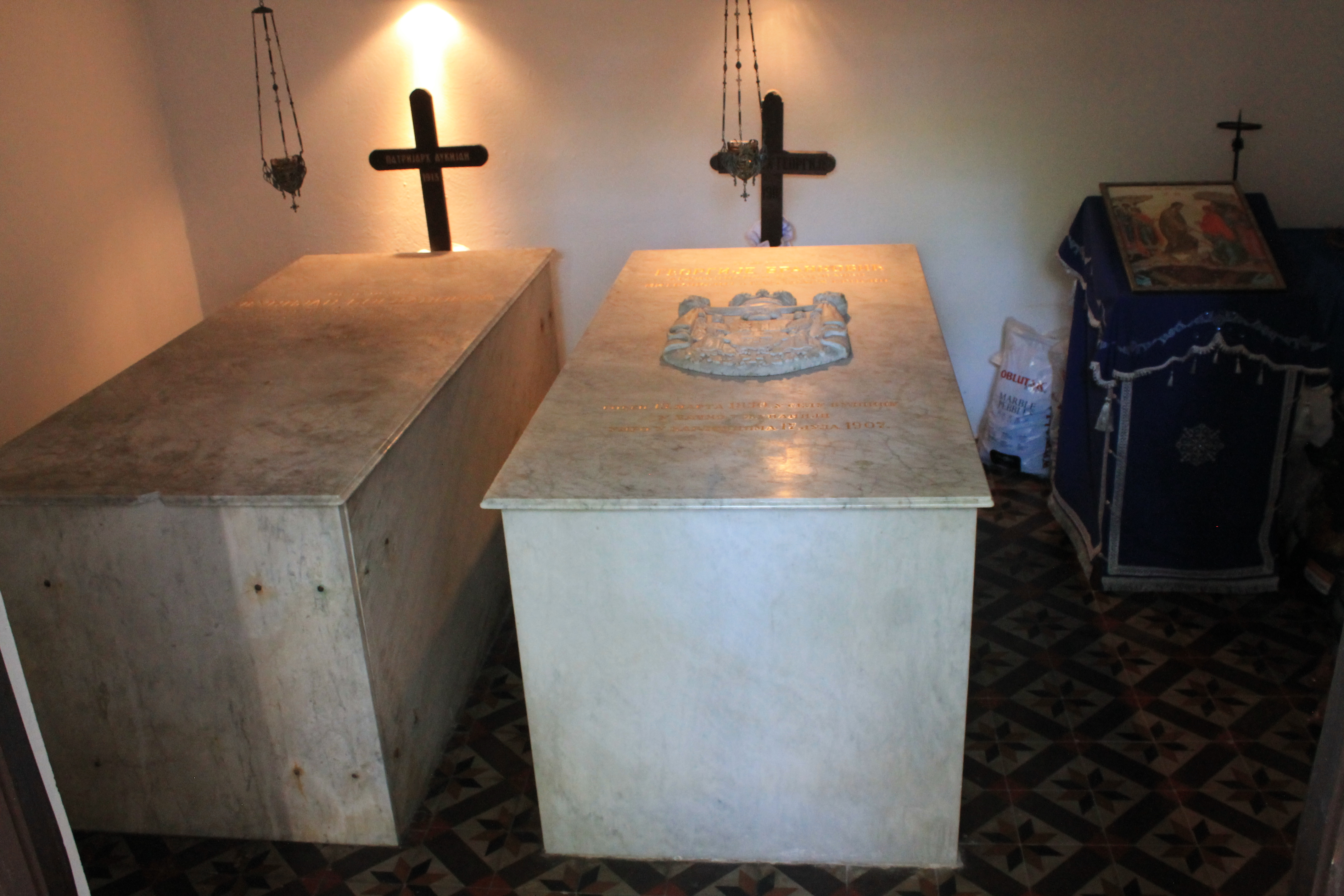 Манастир Ваведења Пресвете Богородице, Сремски Карловци